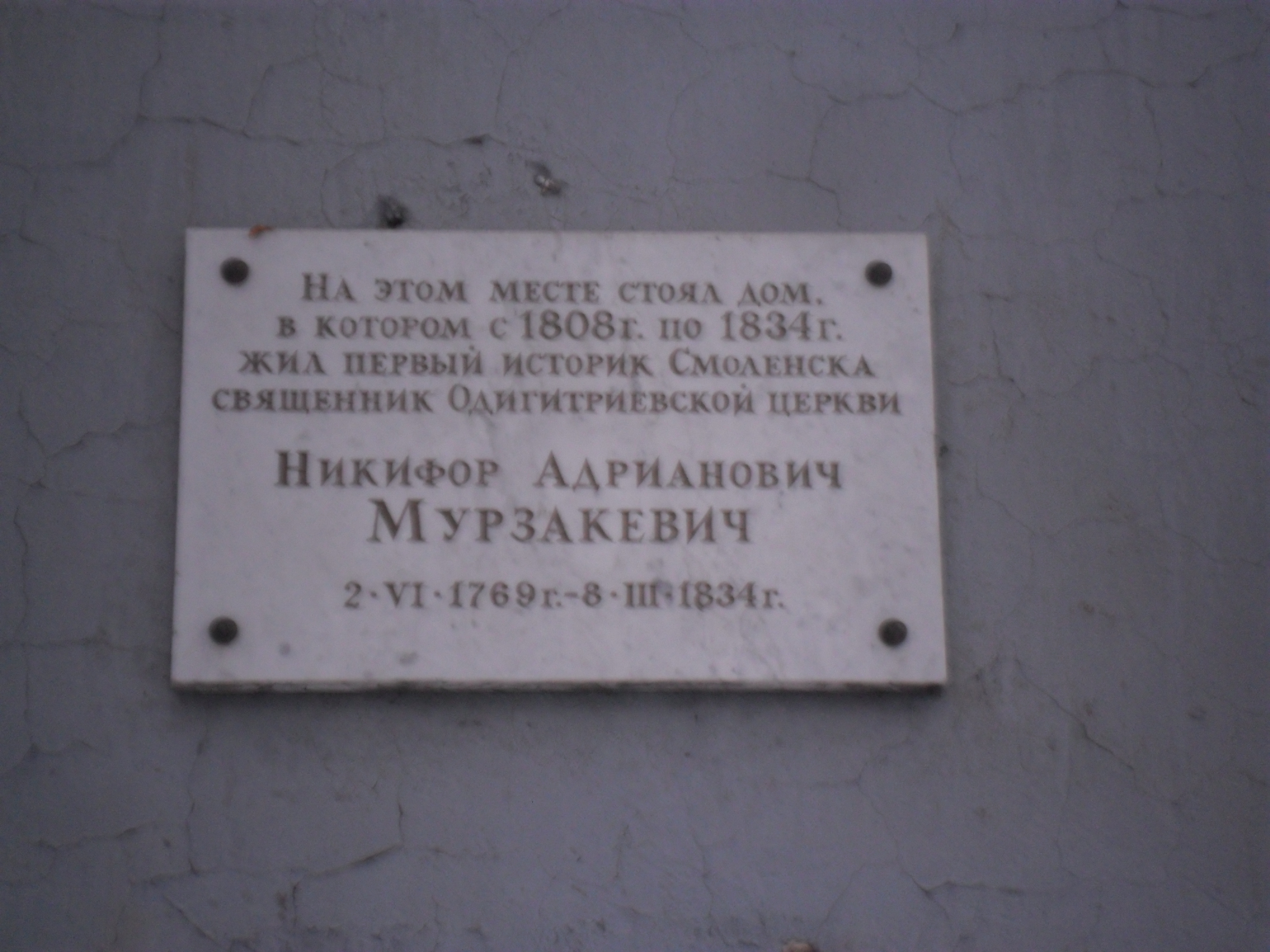 Мемориальная доска историку Никифору Мурзакевичу на улице Ленина в Смоленске.